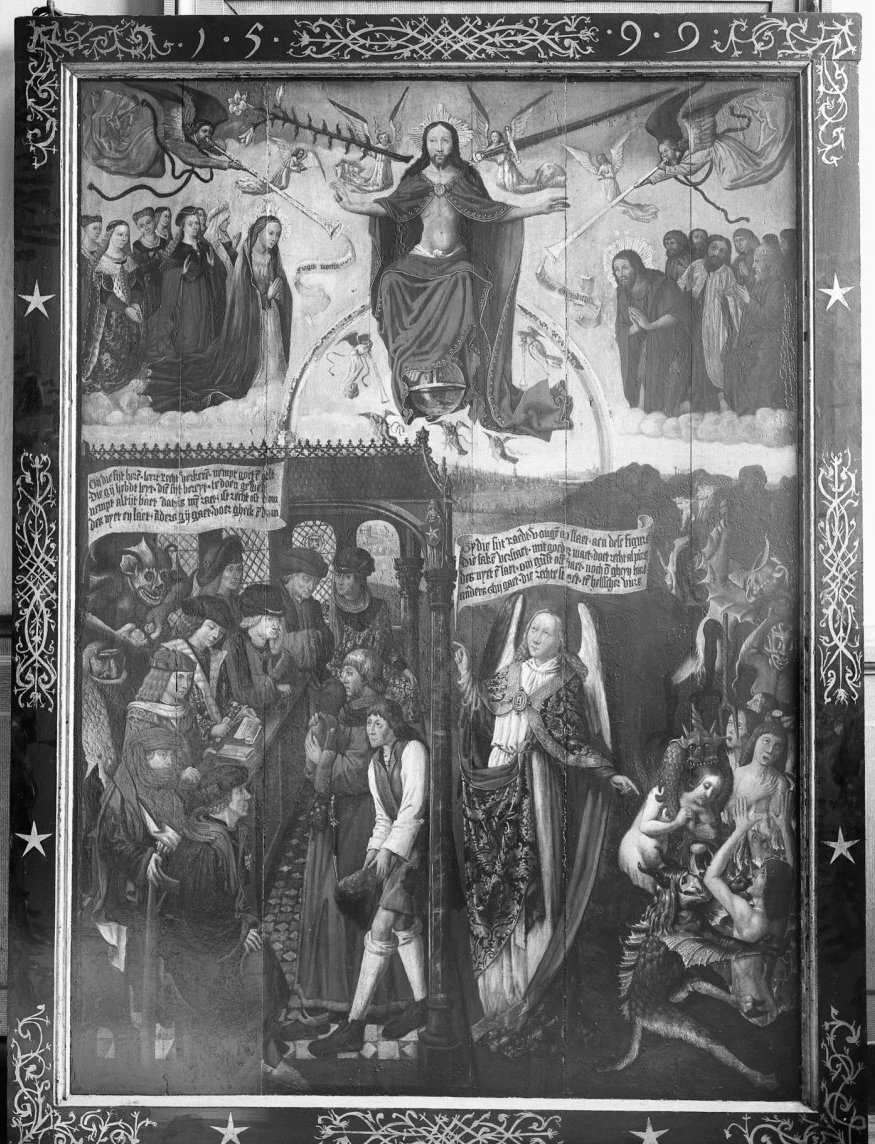 Stadhuis: Schilderij gedateerd 1599